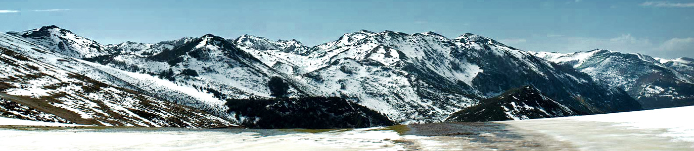 Nevada tardía de Marzo en Sierra de Tameza, desde Fancualla, 1080 mslm